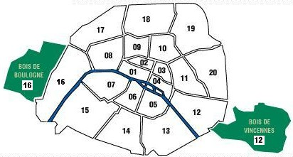 Arrondissements of Paris